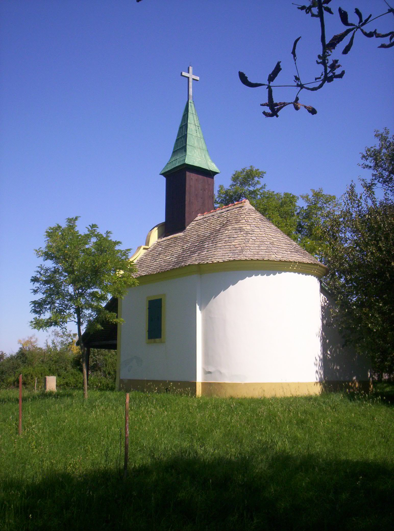 A sükösdi Szent Anna-kápolna. 1747-ben engesztelésül emeltette Pocskai Gergely érseki erdőkerülő, aki állítólag egy vadászaton véletlenül agyonlőtte a kislányát. – photo taken by uploader User:Csanády in 2006.